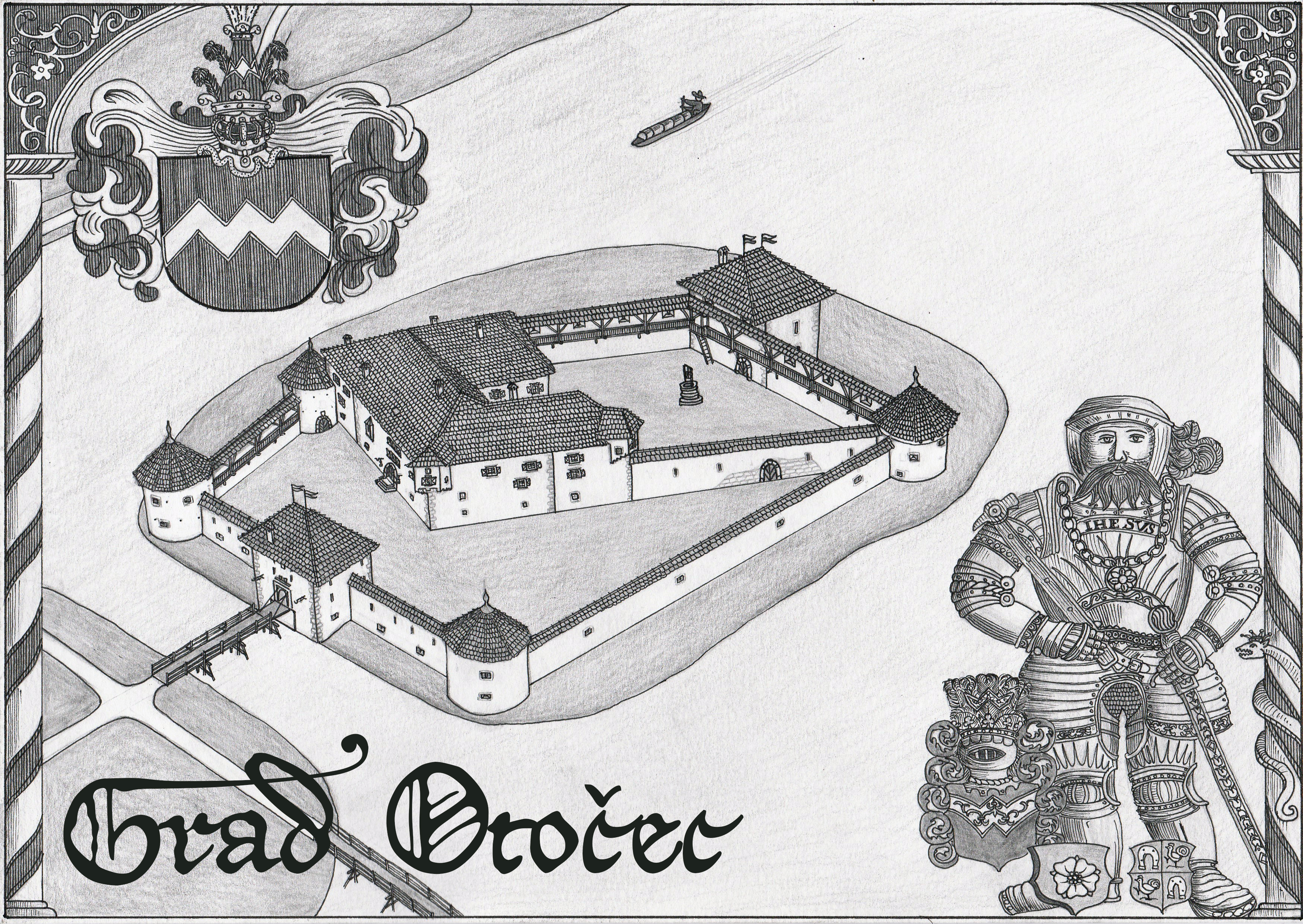 Poskus rekonstrukcije gradu Otočec pri Novem mestu iz 15.stol. Delano na podlagi skicne osnove, tlorisa univ. dipl. inž. arh Igorja Sapača, skici Johannesa Clobucciaricha med leti 1601 - 1605, skice in topografije Janeza Vajkarda Valvasorja (1679), franciscejskem katastru za Kranjsko,1823-1869, 3D lidarskih posnetkov, predvojnih razglednic in terenskih fotografij. Grb plemiške družine Villanders iz 17. stol. izrisan na podlagi upodobitev iz Velike grbovne knjige, avtorja Janeza Vajkarda Valvasorja. Izris renesančnega nagrobnika Viljema Villandersa (1493-1547), lastnika gradu Otočec, danes v hodniku frančiškanskega samostana v Novem mestu.